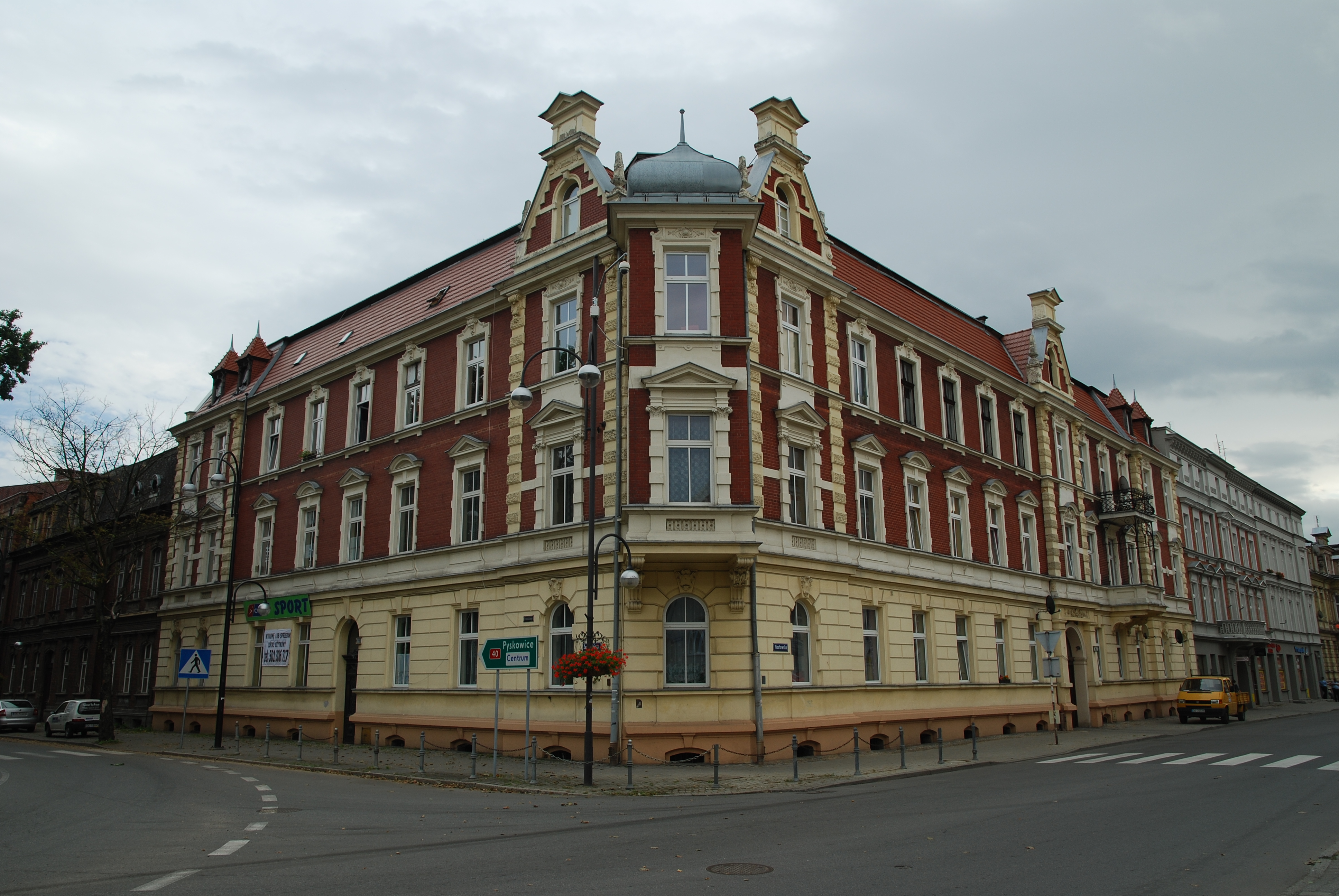 Kędzierzyn-Koźle budynek mieszkalny przy ul. Żeromskiego 9 OP